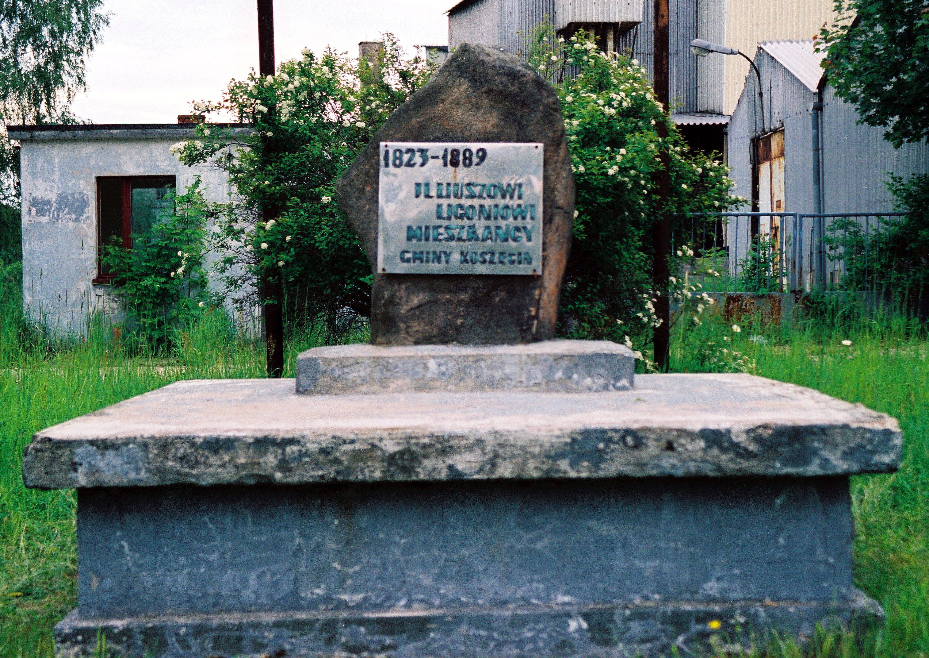 Pomnik Juliusza Ligonia w Prądach, gmina Koszęcin, powiat lubliniecki, województwo śląskie